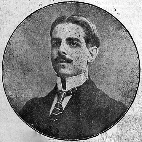 Portreto de Bernardino Martins d’Almeida, portugala esperantisto.